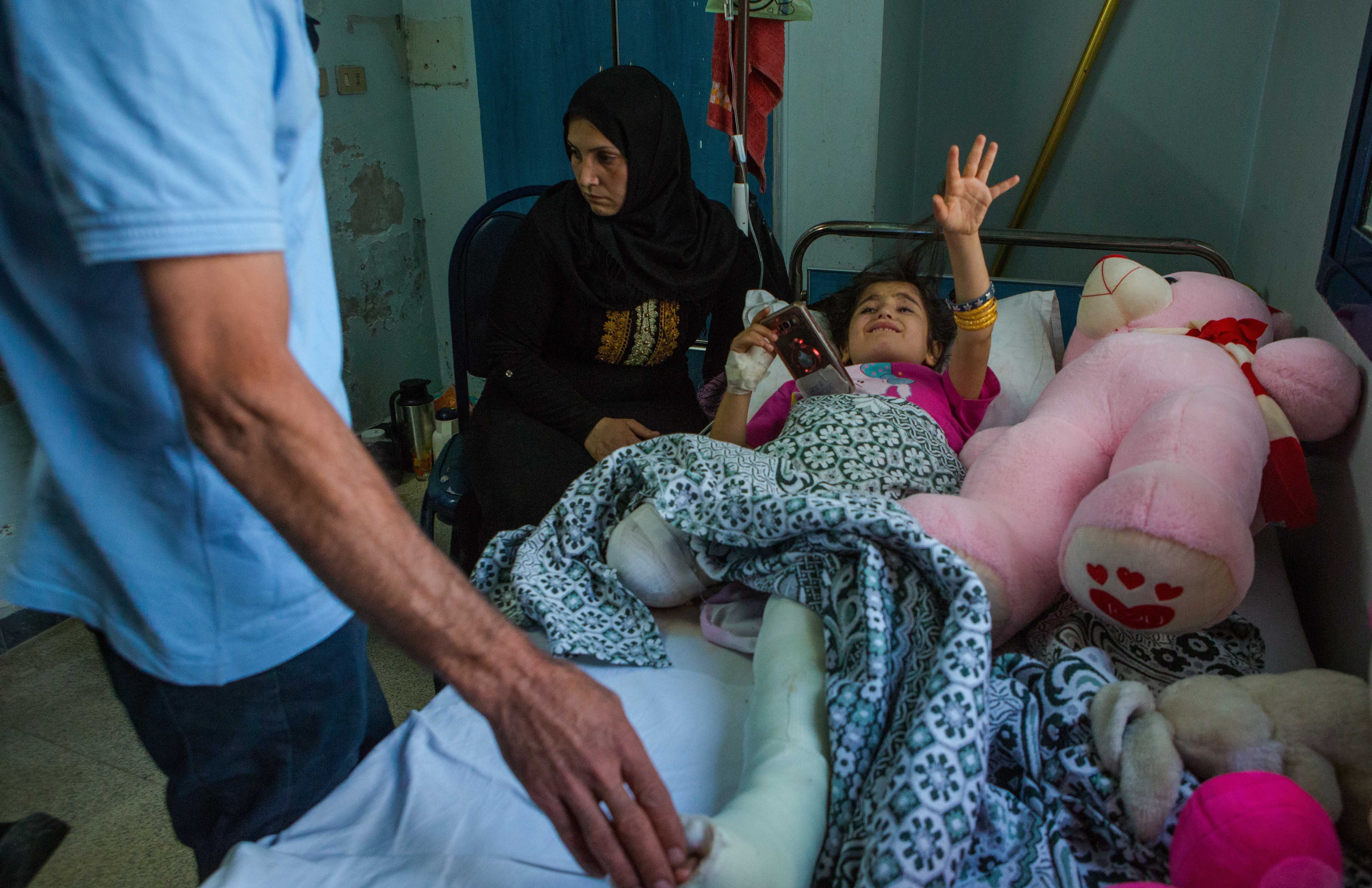 Barış Pınarı harekâtı sonrası Kamışlı'da yaralandıktan sonra bir ayağı kesilen diğer ayağı da kırılan 8 yaşındaki Sarah.